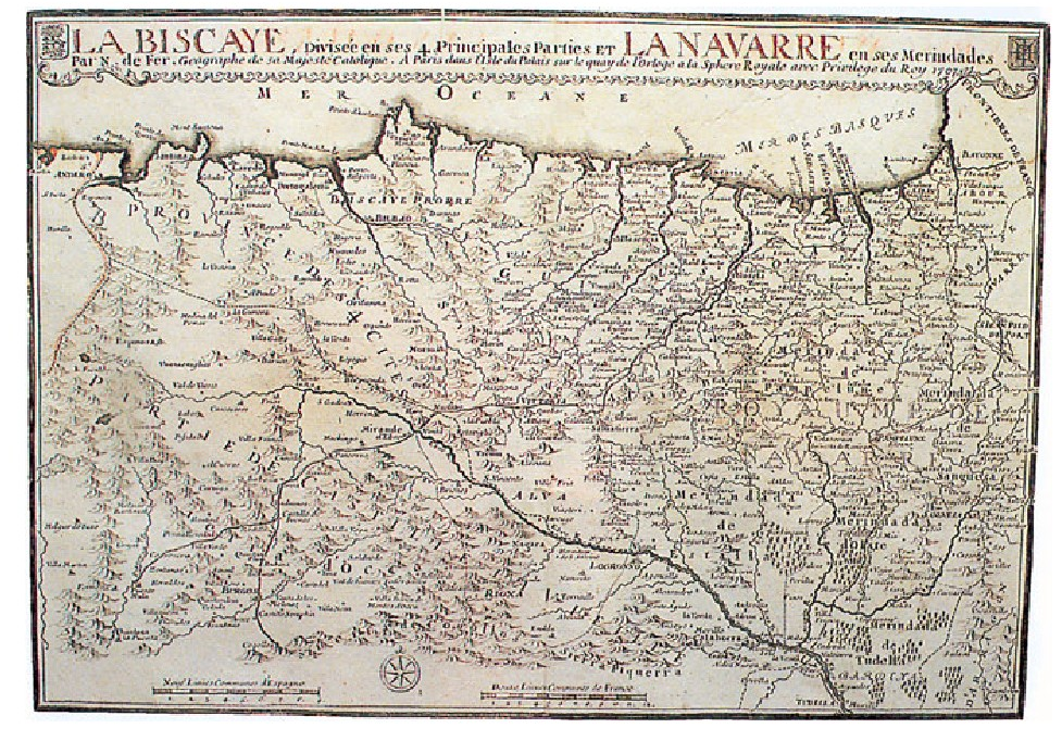 “La Biscaye divisée en ses 4 principales parties et la Navarre en ses merindades”. Nicolas de Fer. 1707. (Argazkia: J. G. Bilduma: J. R. S.).